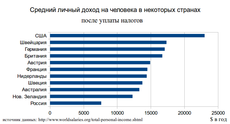 Средний личный доход на человека в некоторых странах. После уплаты налогов. Доходы в источнике указаны на основе PPP - purchasing power parity. То есть с учетом цен в разных странах. Источник данных